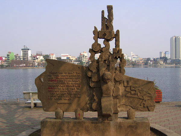 Памятник пленению Дж. Маккейна, расположенный на берегу Западного озера в Ханое. На барельефе изображён американский летчик, стоящий на коленях с поднятыми вверх руками: "В день 26 октября 1967 года было сбито в общей сложности 10 американских самолетов. Раненый Дж. Маккейн, майор ВВС США, удачно катапультировался из сбитого самолета, и на этом месте он был взят в плен. Его самолет упал в нескольких километрах от этого места у электростанции Иенфу"— Надпись на памятнике